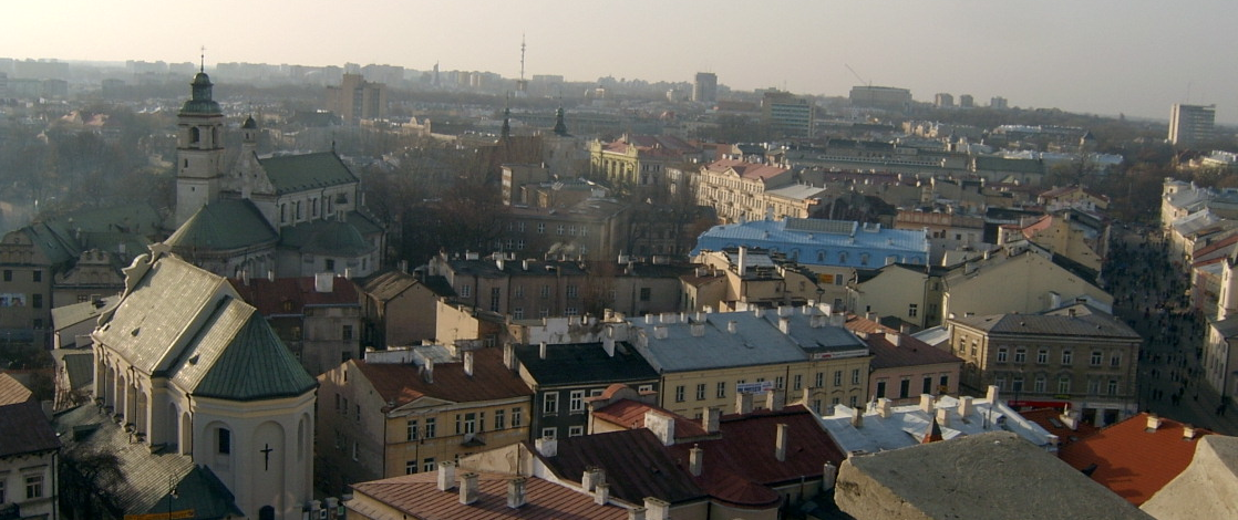 Lublin